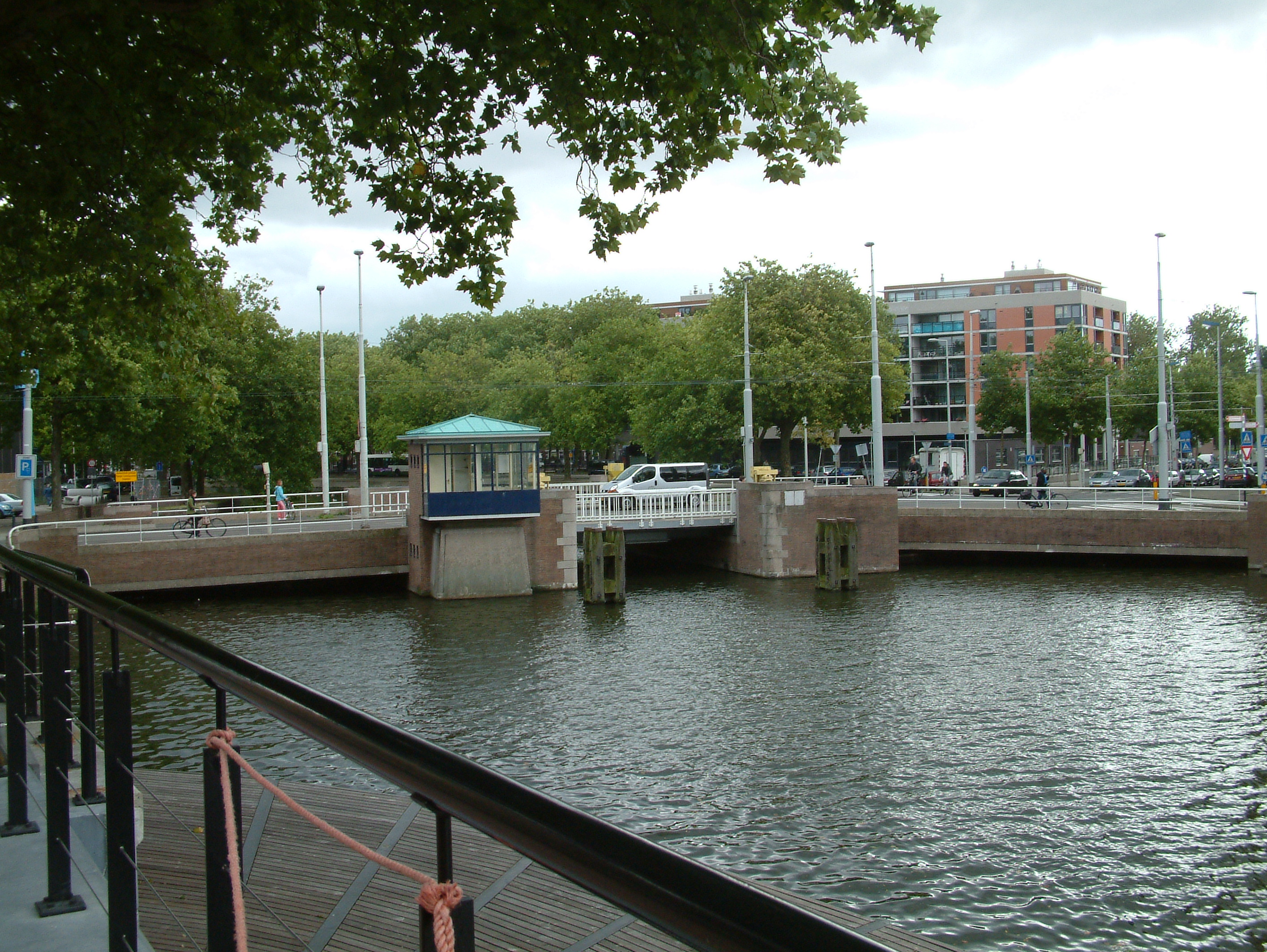 Bruggen over de Rotte, De Zaagmolenbrug, noordkant